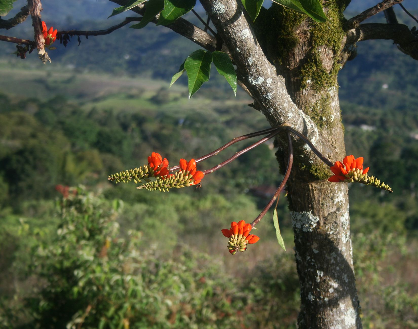 Erythrina edulis, Hülsenfrüchtler (Fabaceae), Schmetterlingsblütler (Faboideae) – Kolumbien/Colombia: Dpto. Huila, Parque Arqueológico Nacional San Agustín e Isnos, Alto de Lavapatas, ca. 3 km W San Agustín, ca. 1770–1780 m